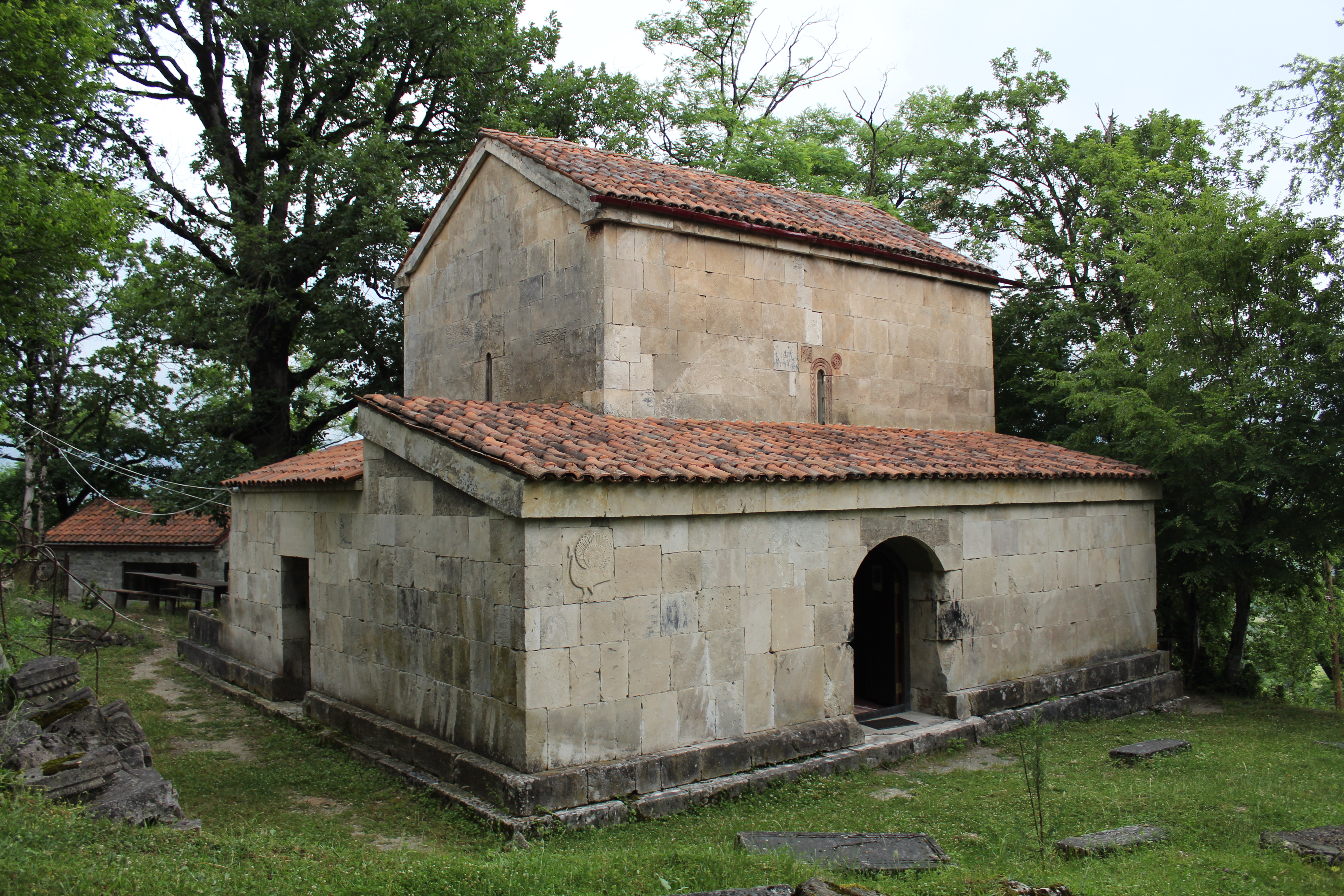 დარკვეთის წმინდა გიორგის ეკლესია